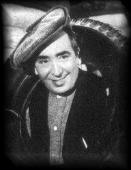 Pepe Arias